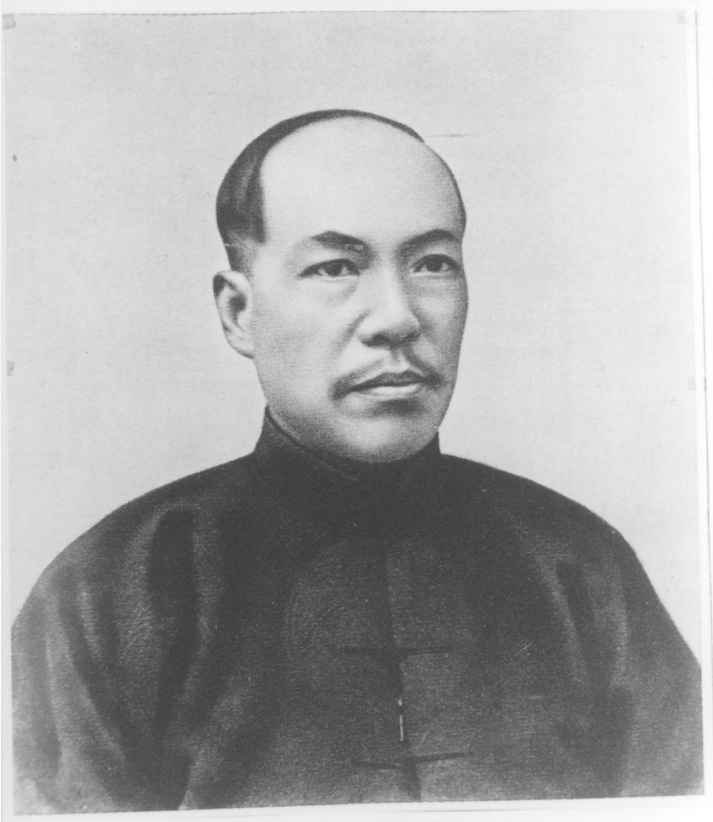 Лян Цичао